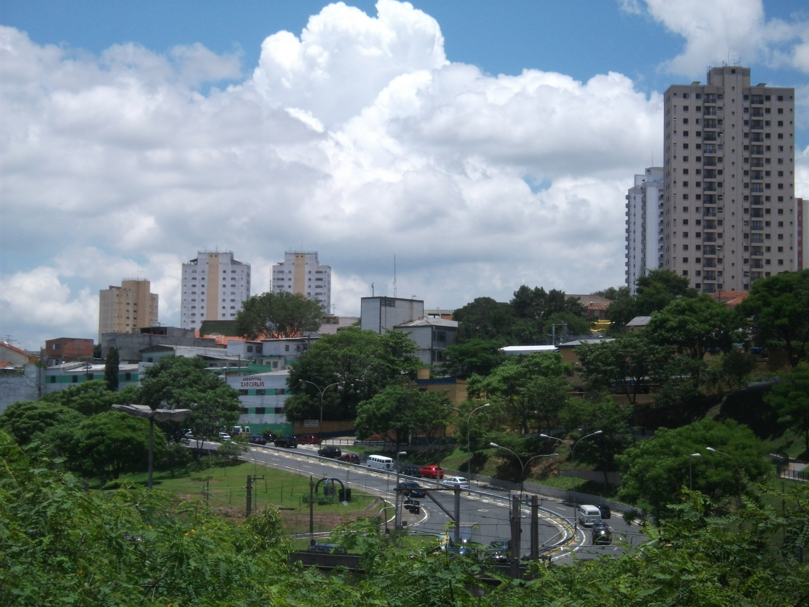 Vista da Vila Matilde a partir da Estação do Metrô da Vila Matilde